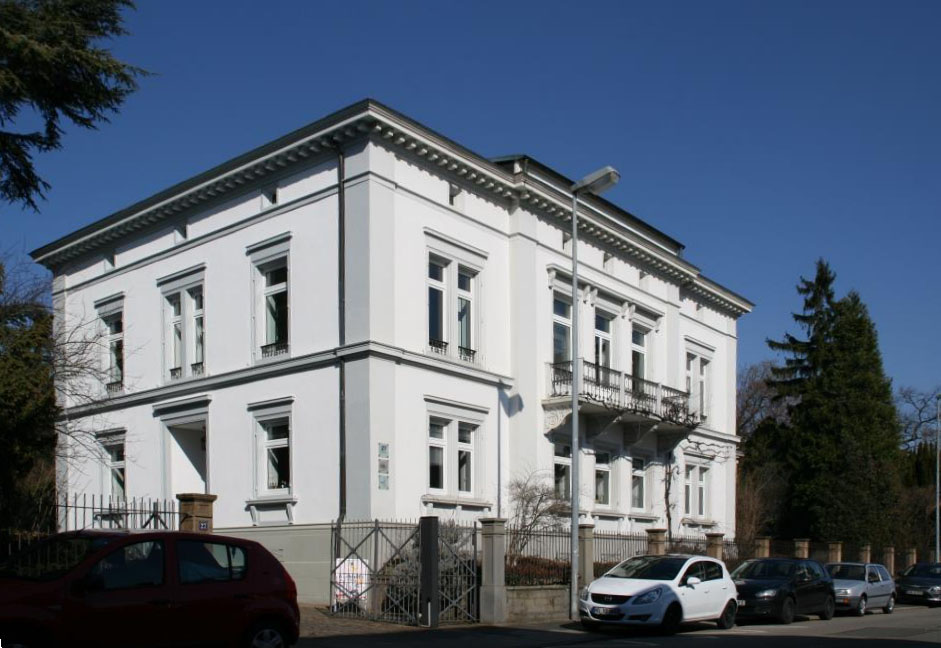 Villa Neustadt an der Weinstraße, erbaut 1848, Architekt Ferdinand Stadler